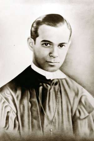 Quadro de formatura de Tancredo Neves, bacharel em Direito pela Universidade de Minas Gerais.